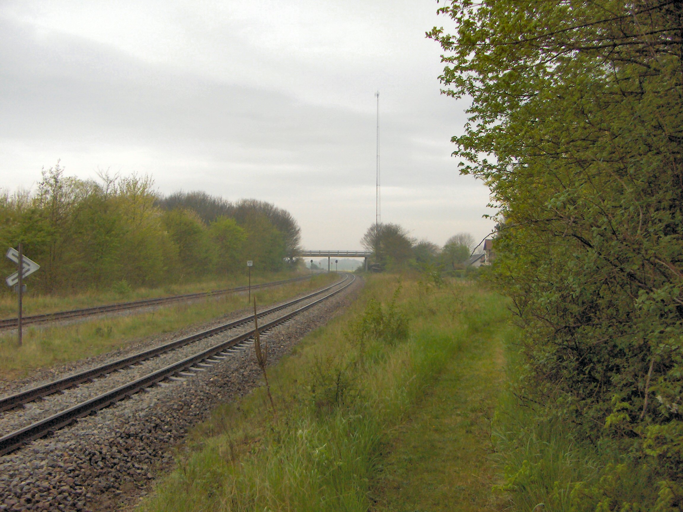 Værslev_Station (nedlagt)